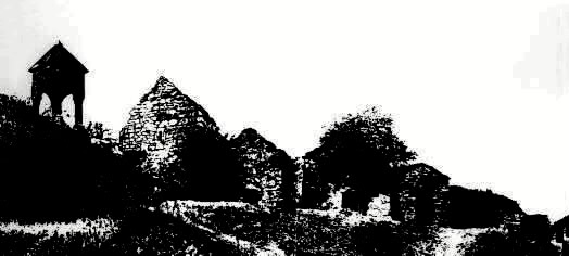 Армянский монастырь св. Елисея, Азербайджан